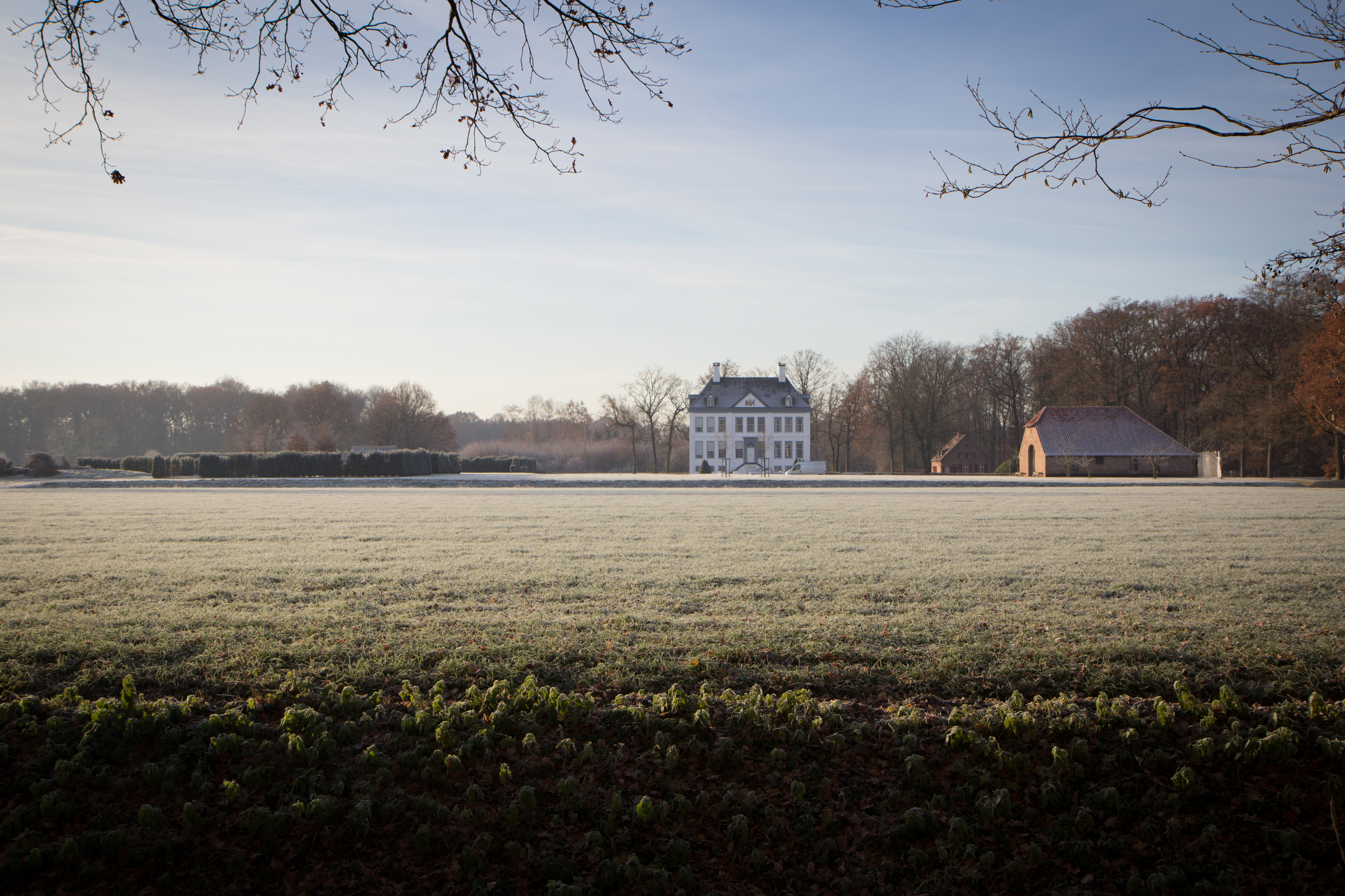 Blick auf Haus Kolk aus Richtung Wanderweg